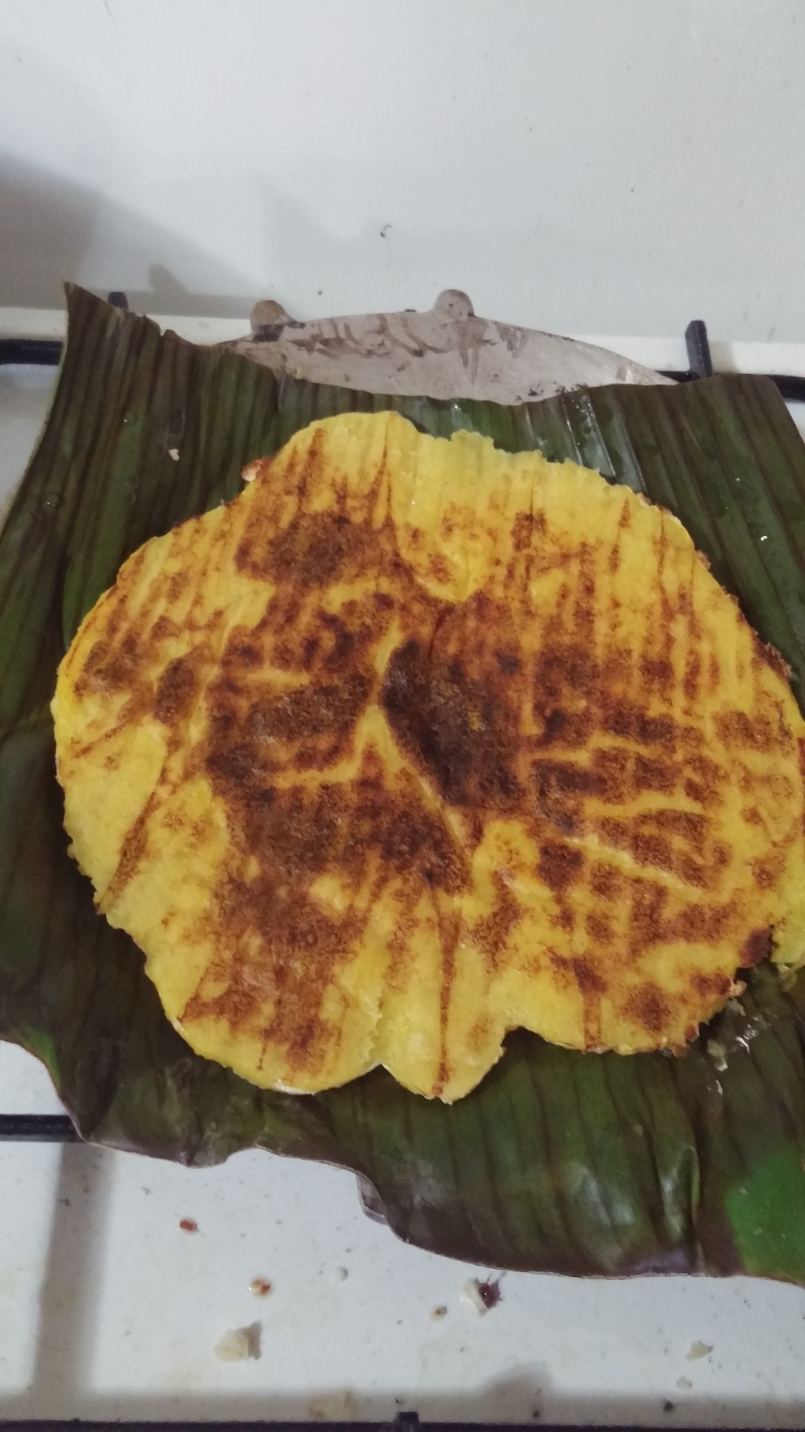 Changa preparada en el distrito de Las Tablas, Provincia de Los Santos, República de Panamá.